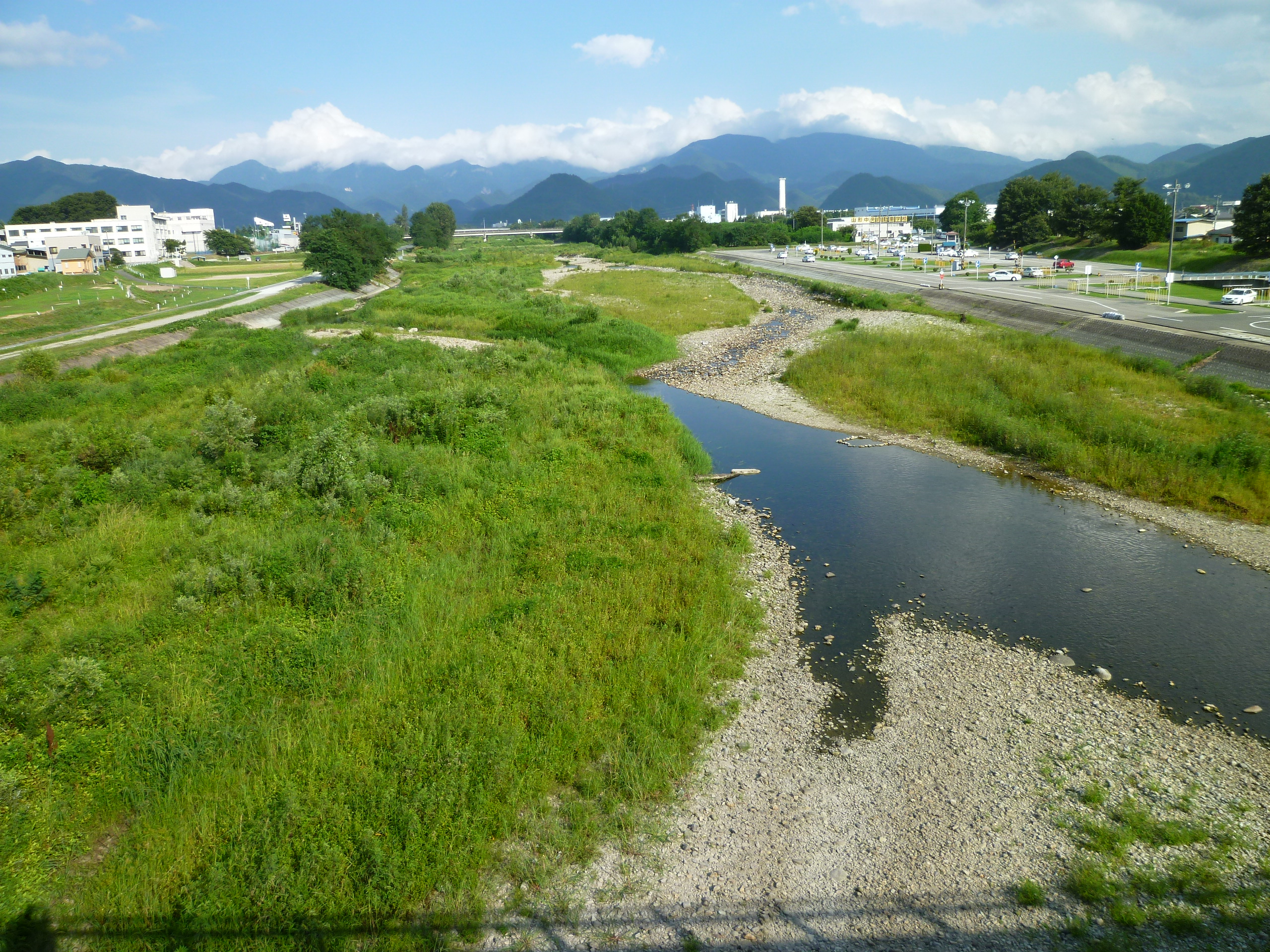 立谷川（天山橋より上流方向）